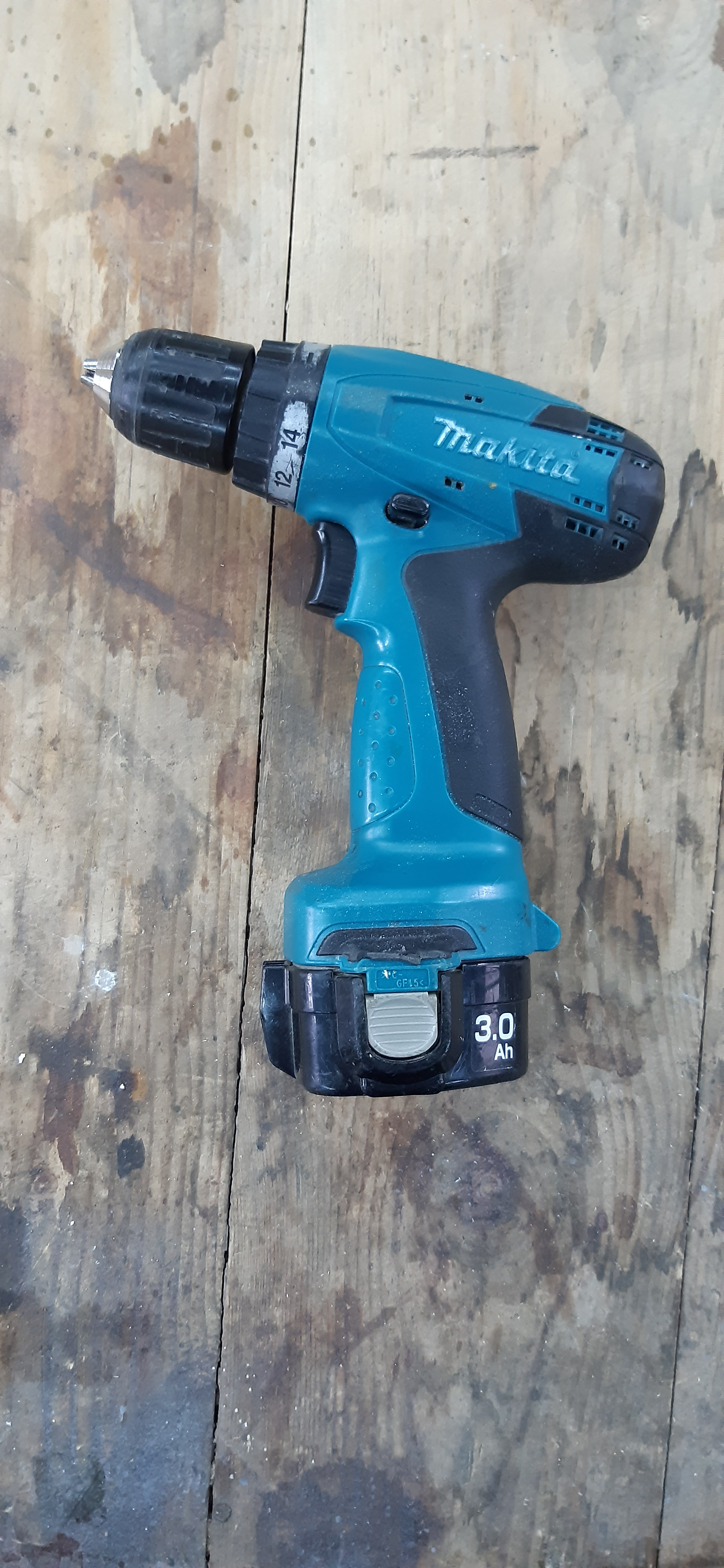 tavaline akutrell